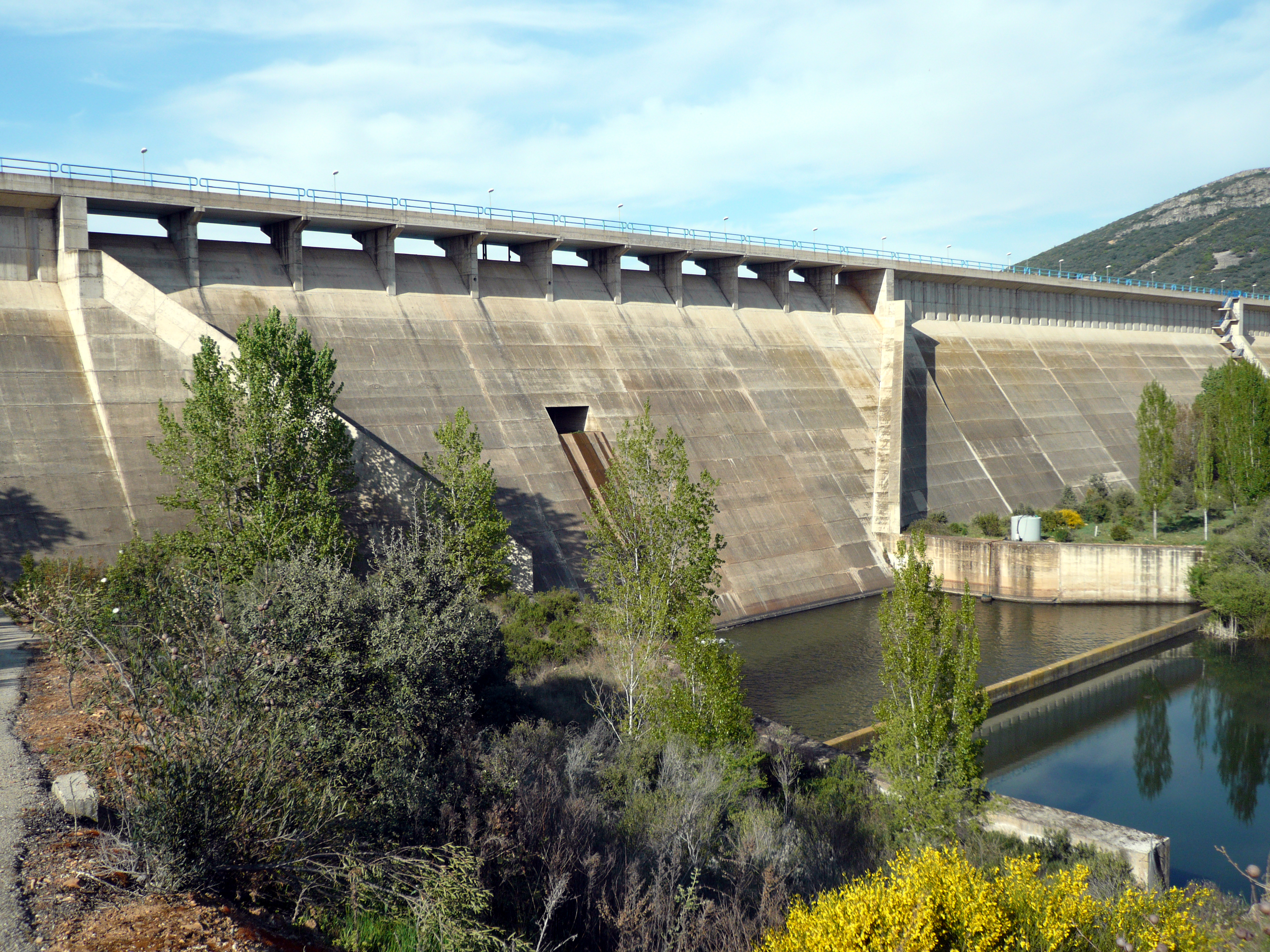 Embalse de la Torre de Abraham, río Bullaque, cuenca del río Guadiana.